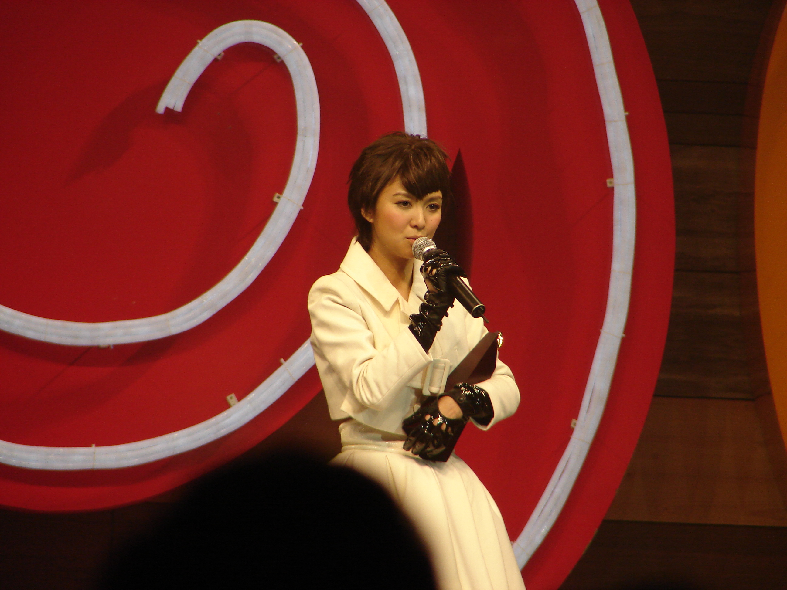 Fiona Sit